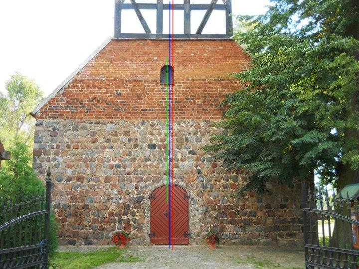 Ściana zachodnia kościoła w Wojcieszycach. Czerwoną linią zaznaczono oś pionowa fasady, niebieską oś portalu, zieloną oś okna.